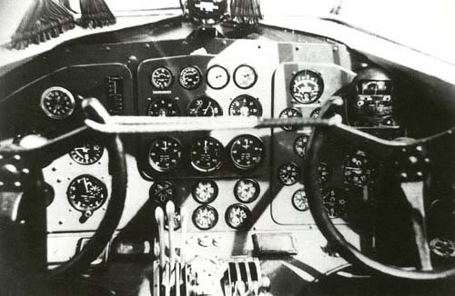 Savoia Marchetti SM.87 idro cockpit